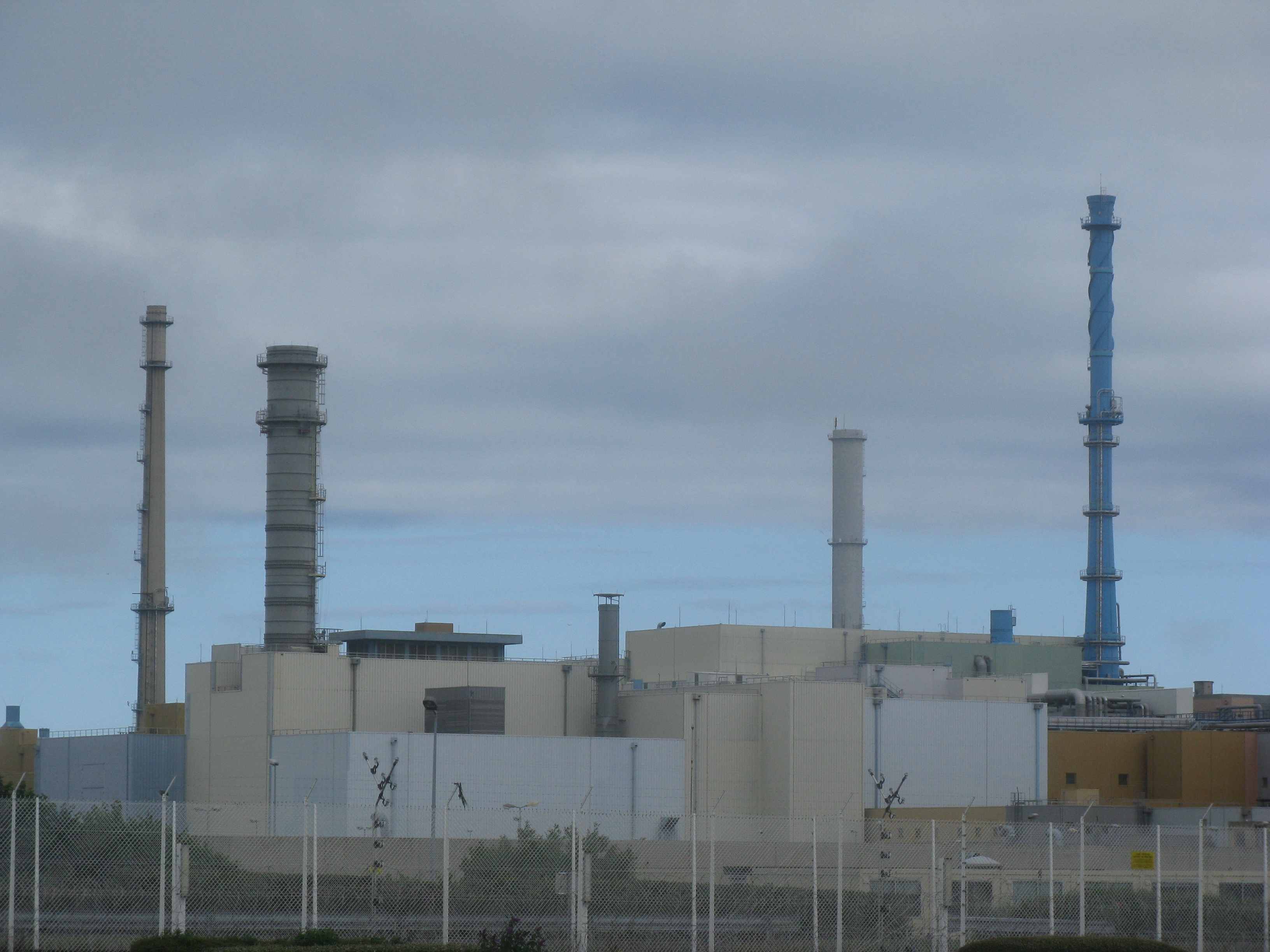 Wiederaufarbeitungsanlage La Hague